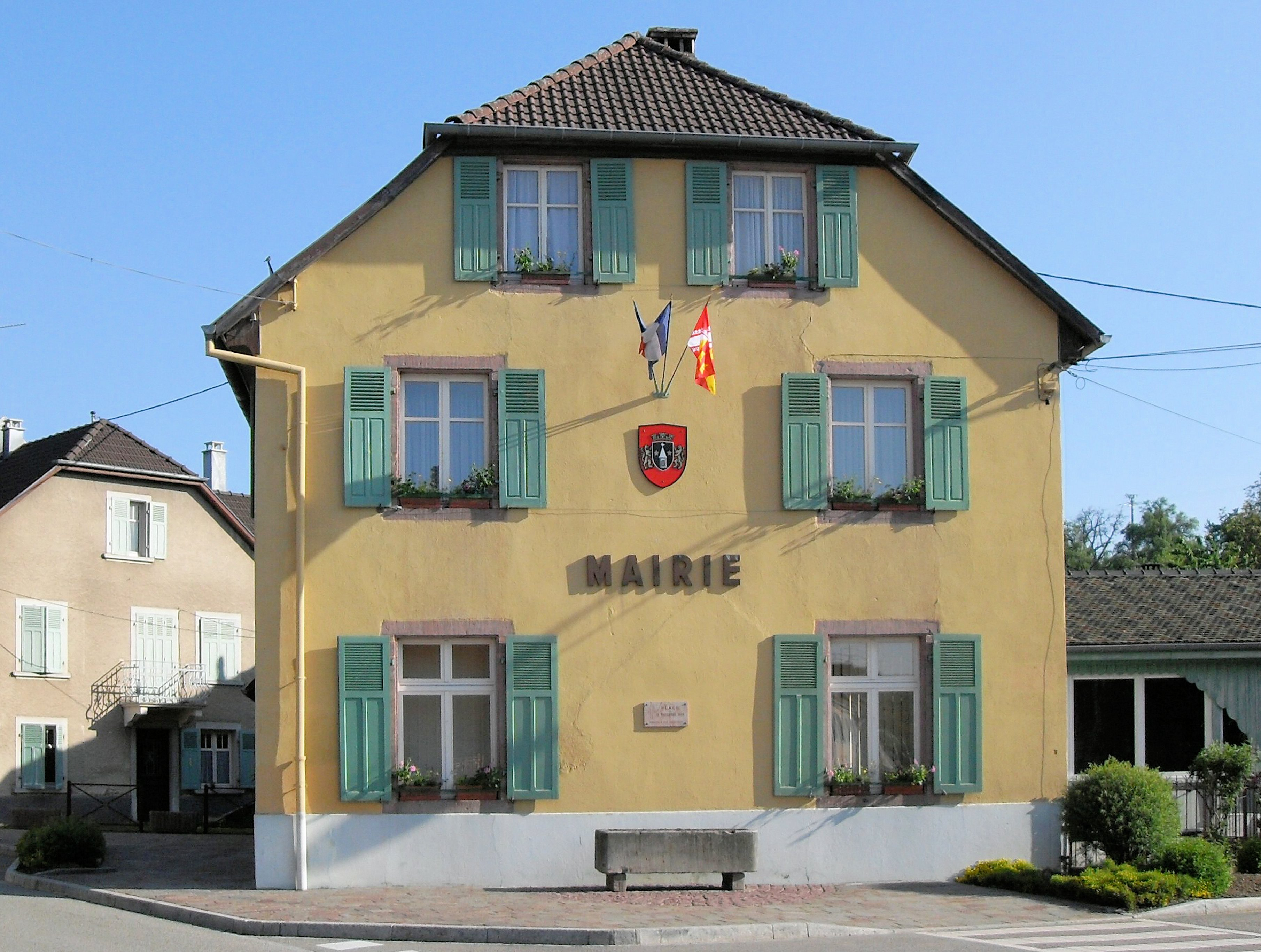 La mairie de Roderen